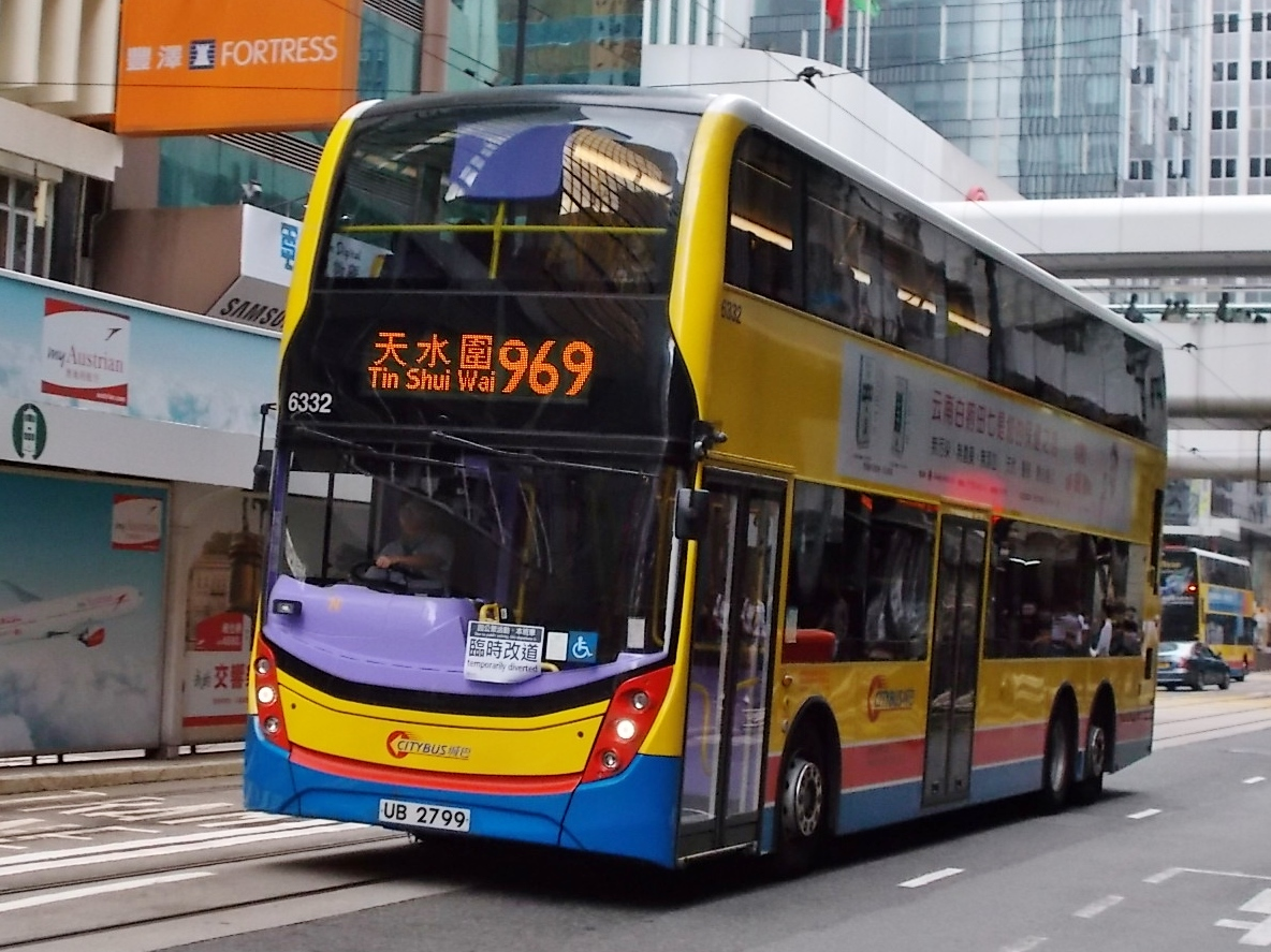 過海隧巴969線，駛經上環德輔道中前往天水圍